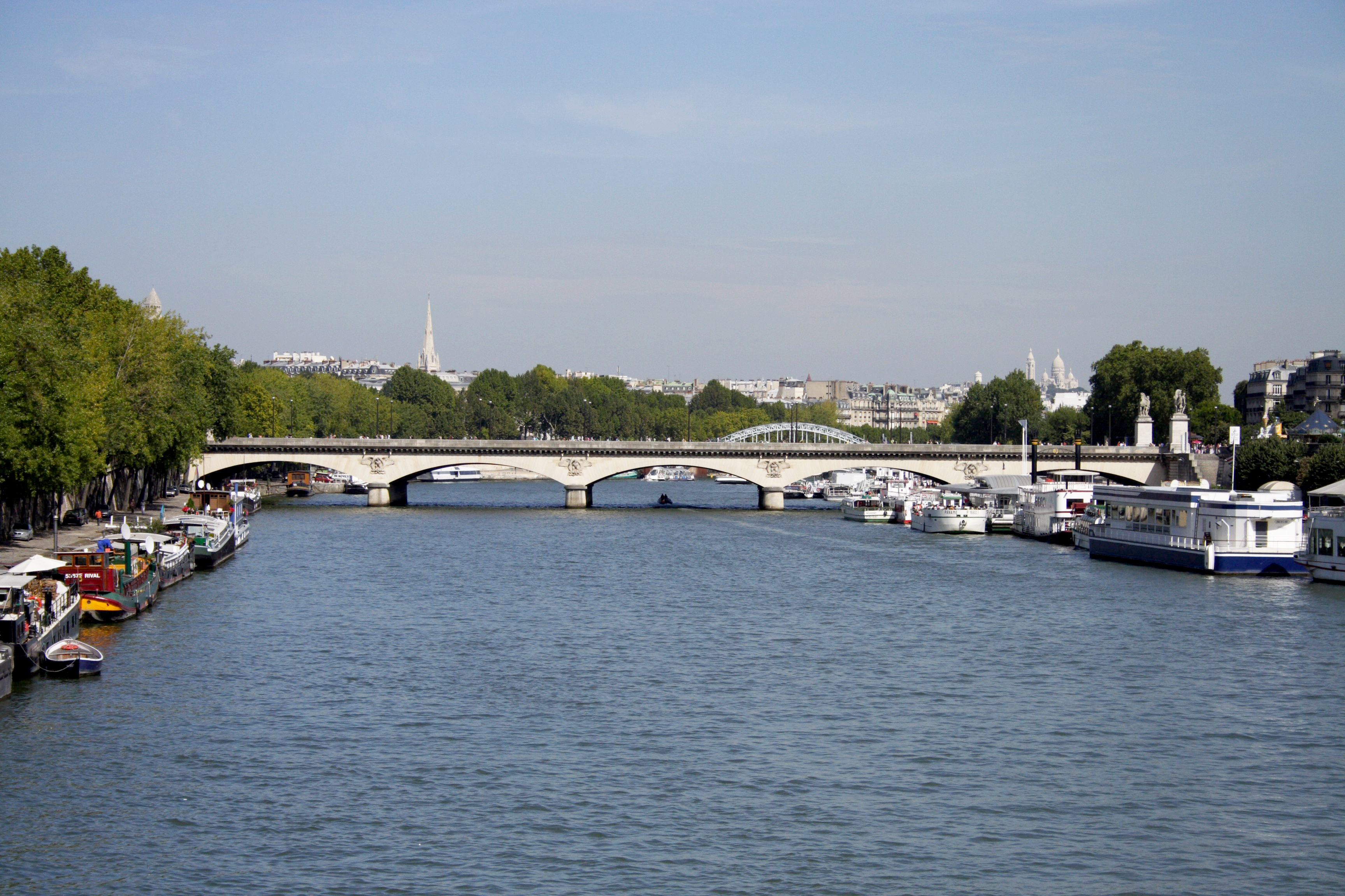 Pont d'Iéna(Paris, France)